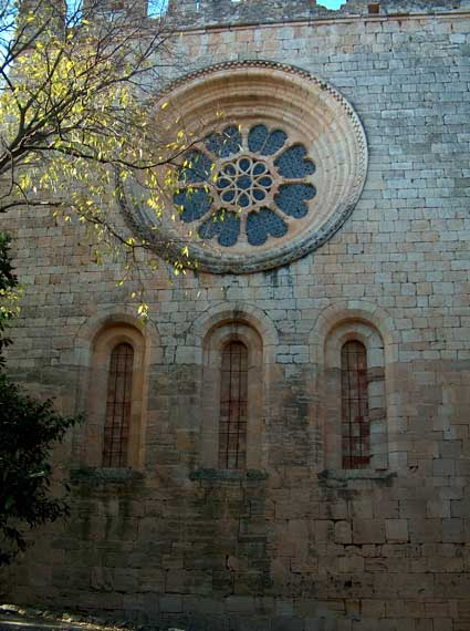 Ábside con rosetón del Monasterio de Santes Creus